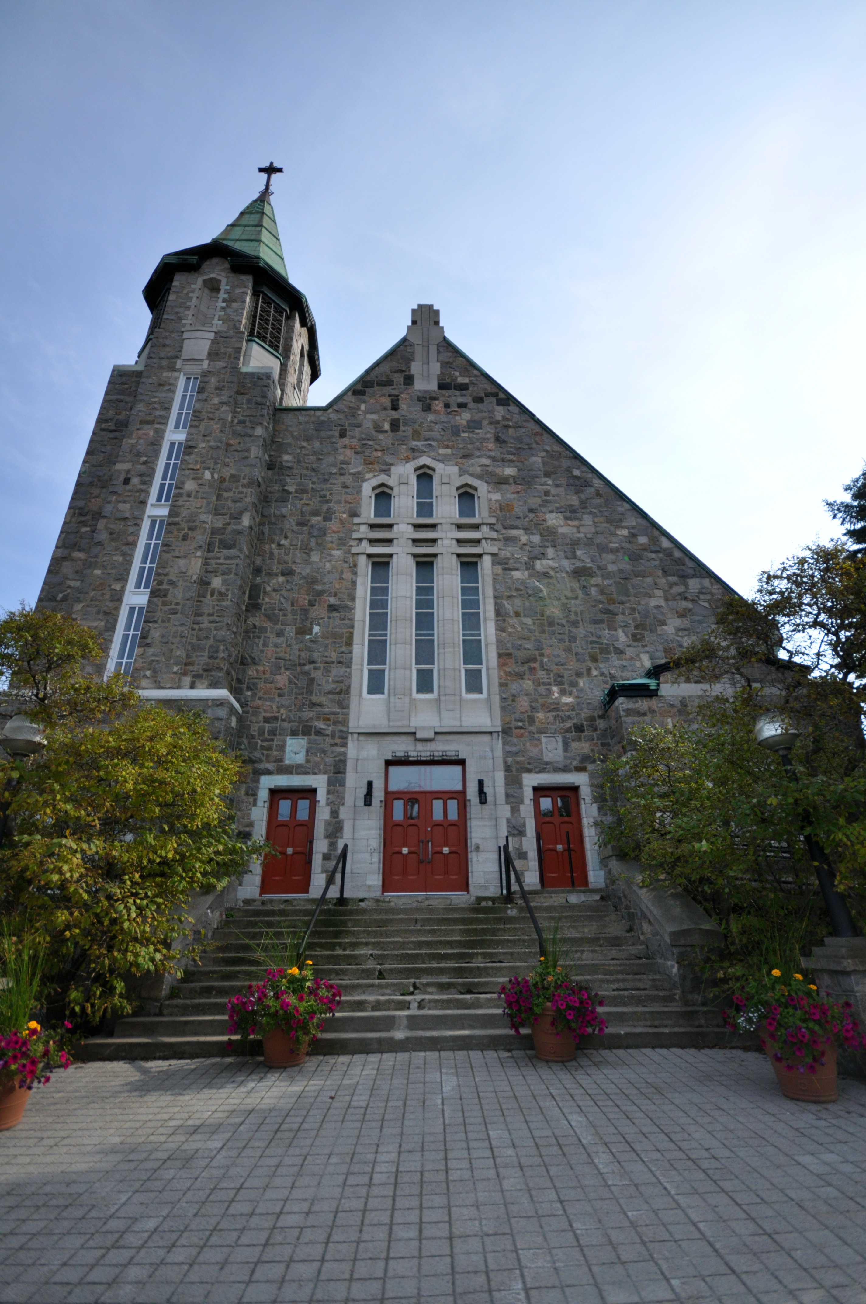 Église de Sainte-Amélie, Avenue Marquette, Baie-Comeau (Canada). (Protection MH cité. Voir la liste des lieux patrimoniaux de la Côte-Nord pour plus de détails).